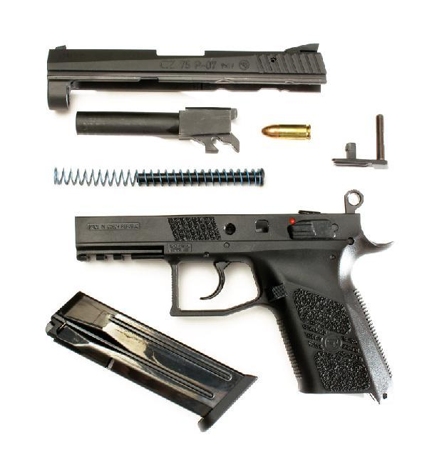 Cz 75 p07 duty připravena k čištění